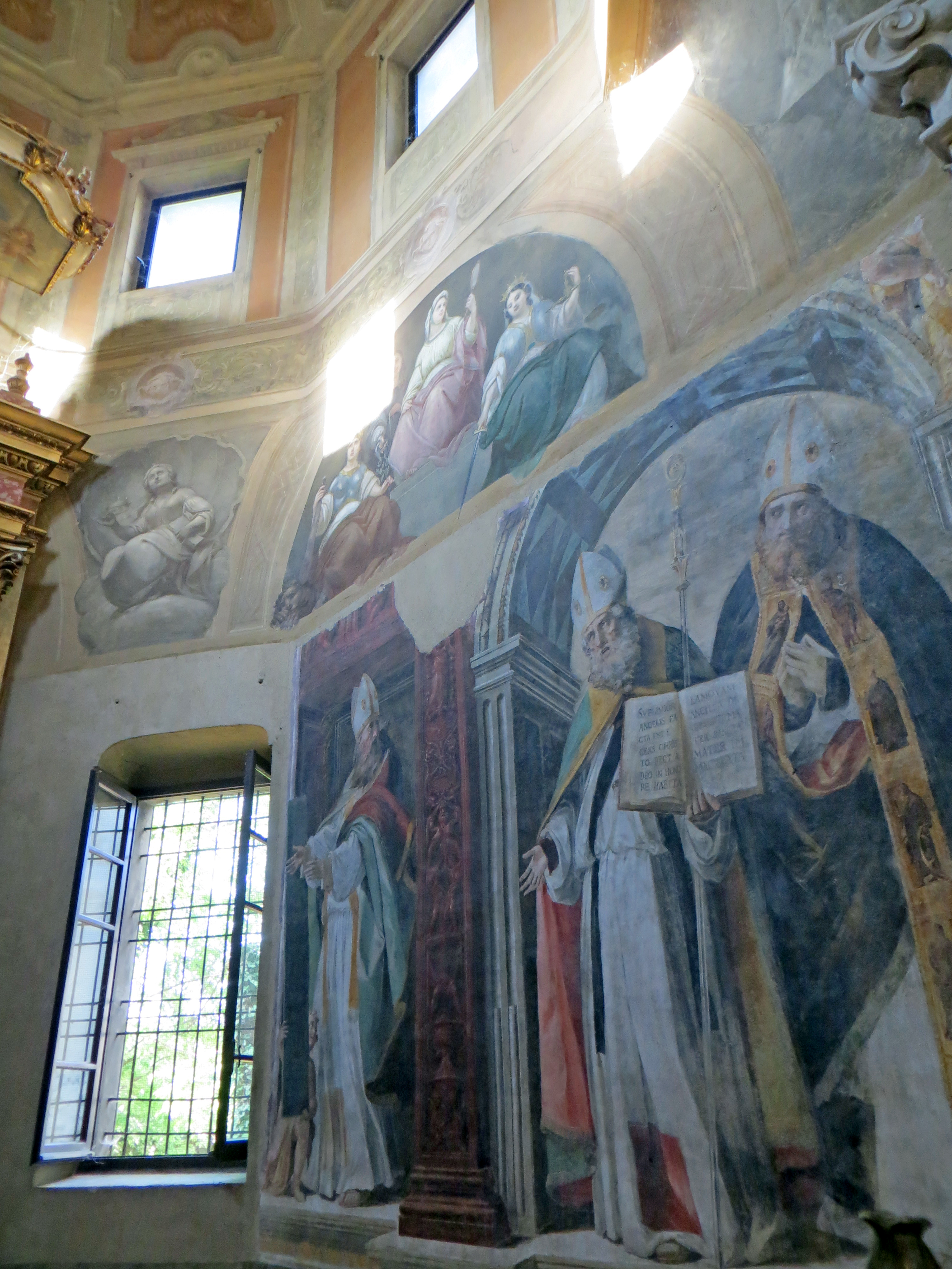 Collegiata di San Bartolomeo Apostolo (Busseto) - cappella della Beata Vergine della Concezione